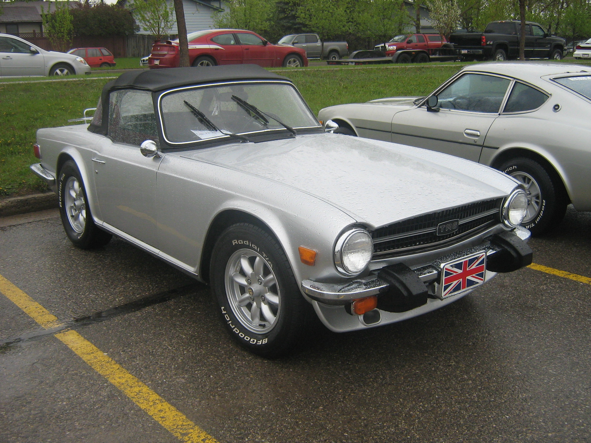 1976 Triumph TR6